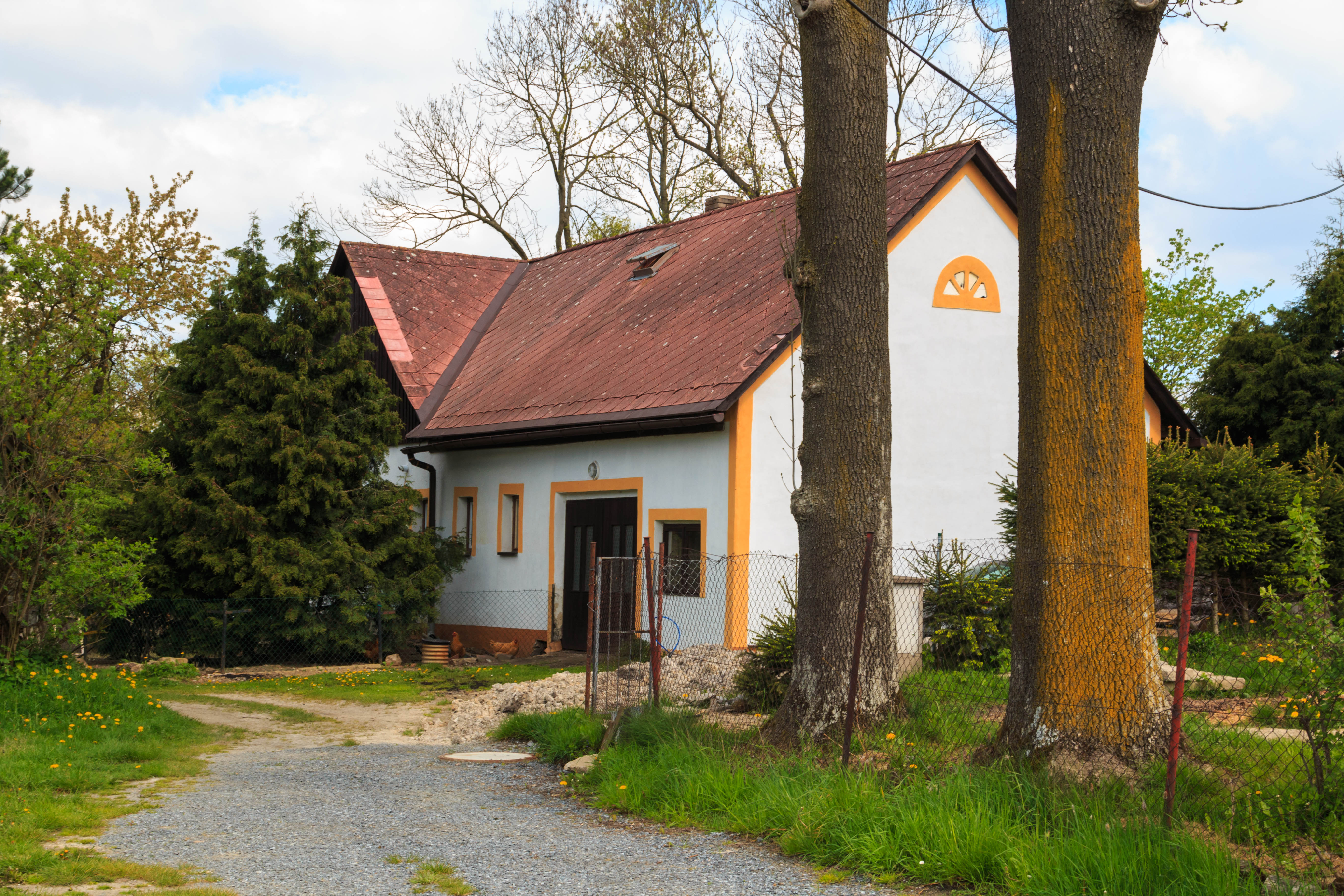 Pec čp. 33